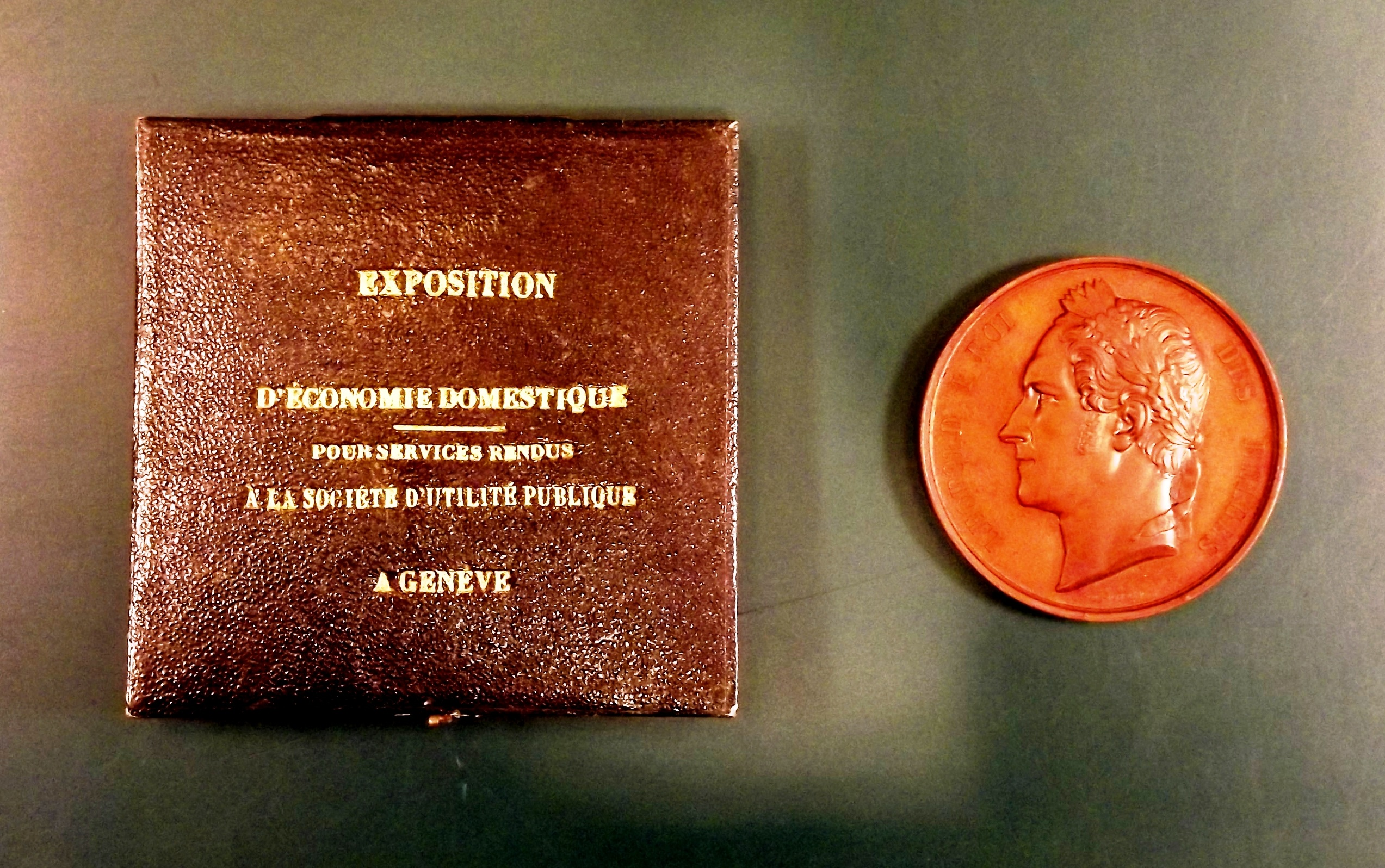 Médaille aujourd'hui conservée aux Archives d'Etat de Genève.